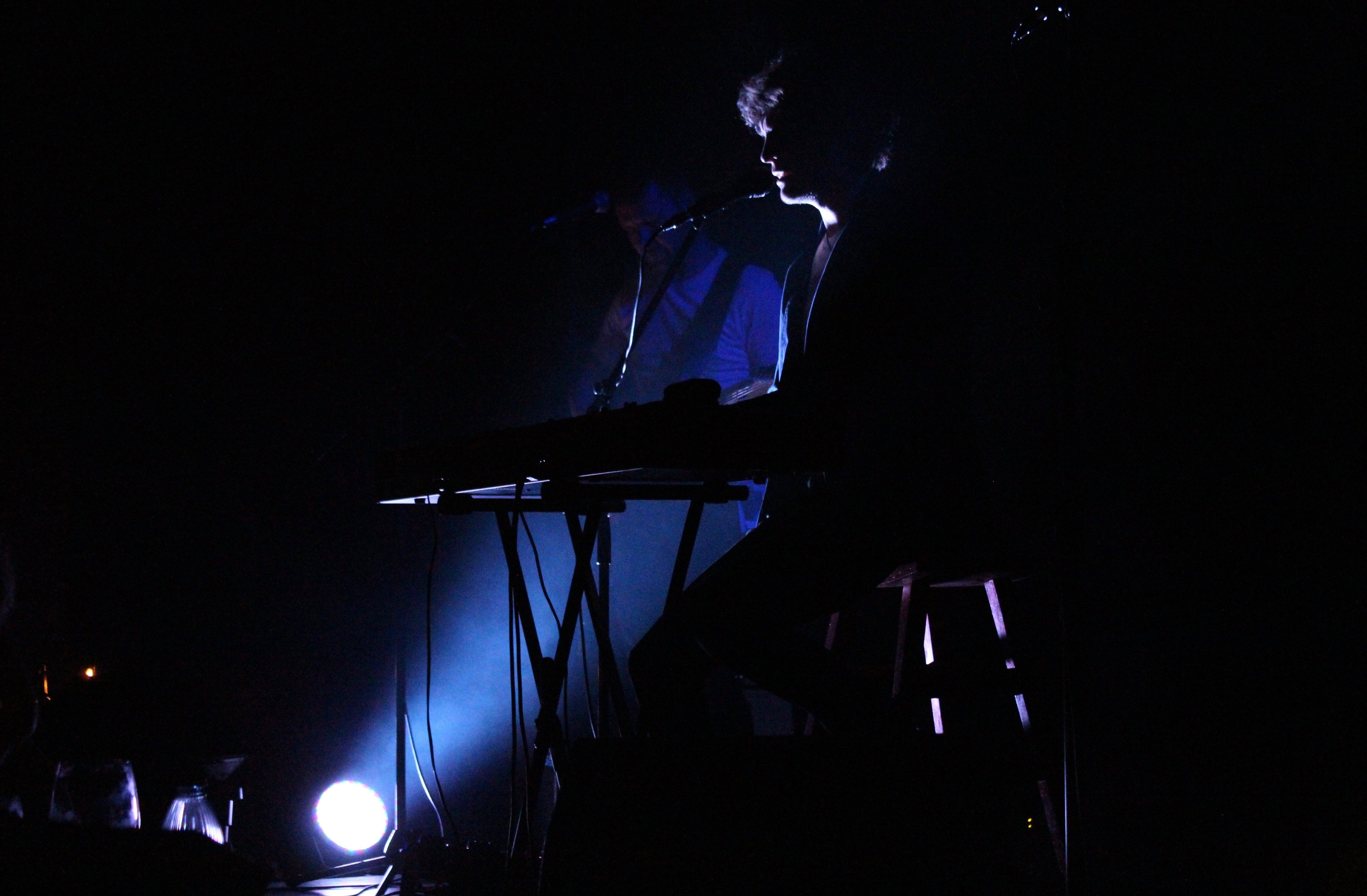 Joshua na die Reën by Die Boer, 7 November 2017